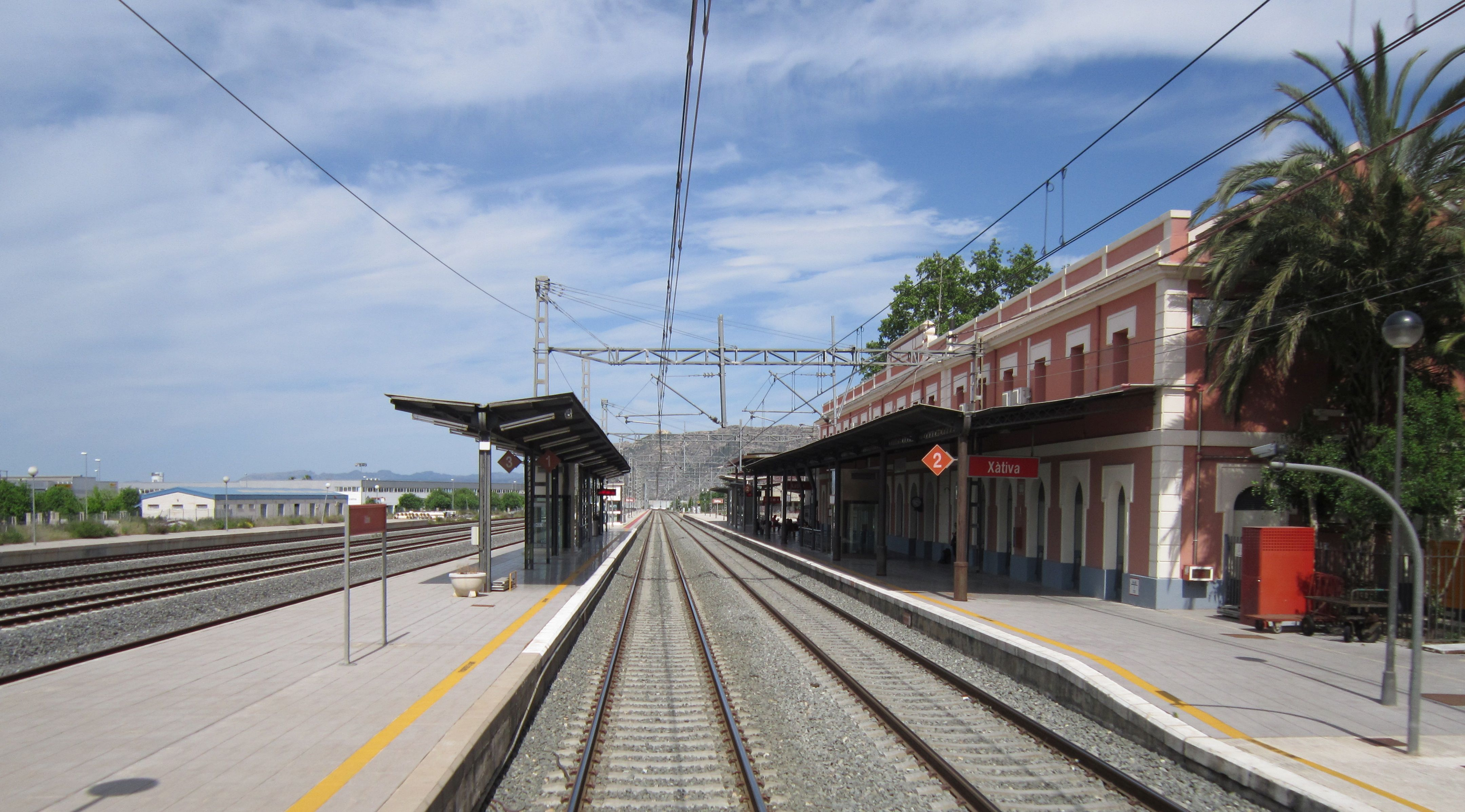 Estació de Xàtiva